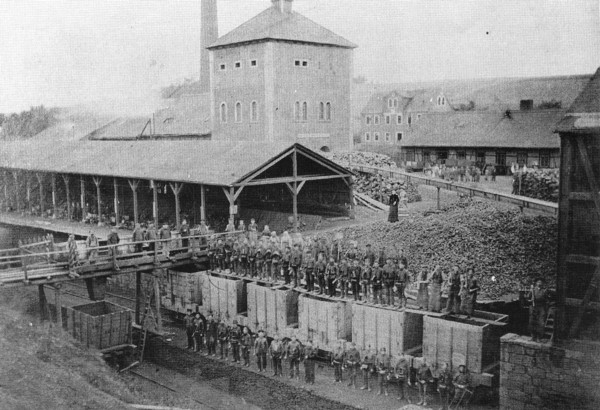 Beharrlichkeitsschacht bei Hänichen